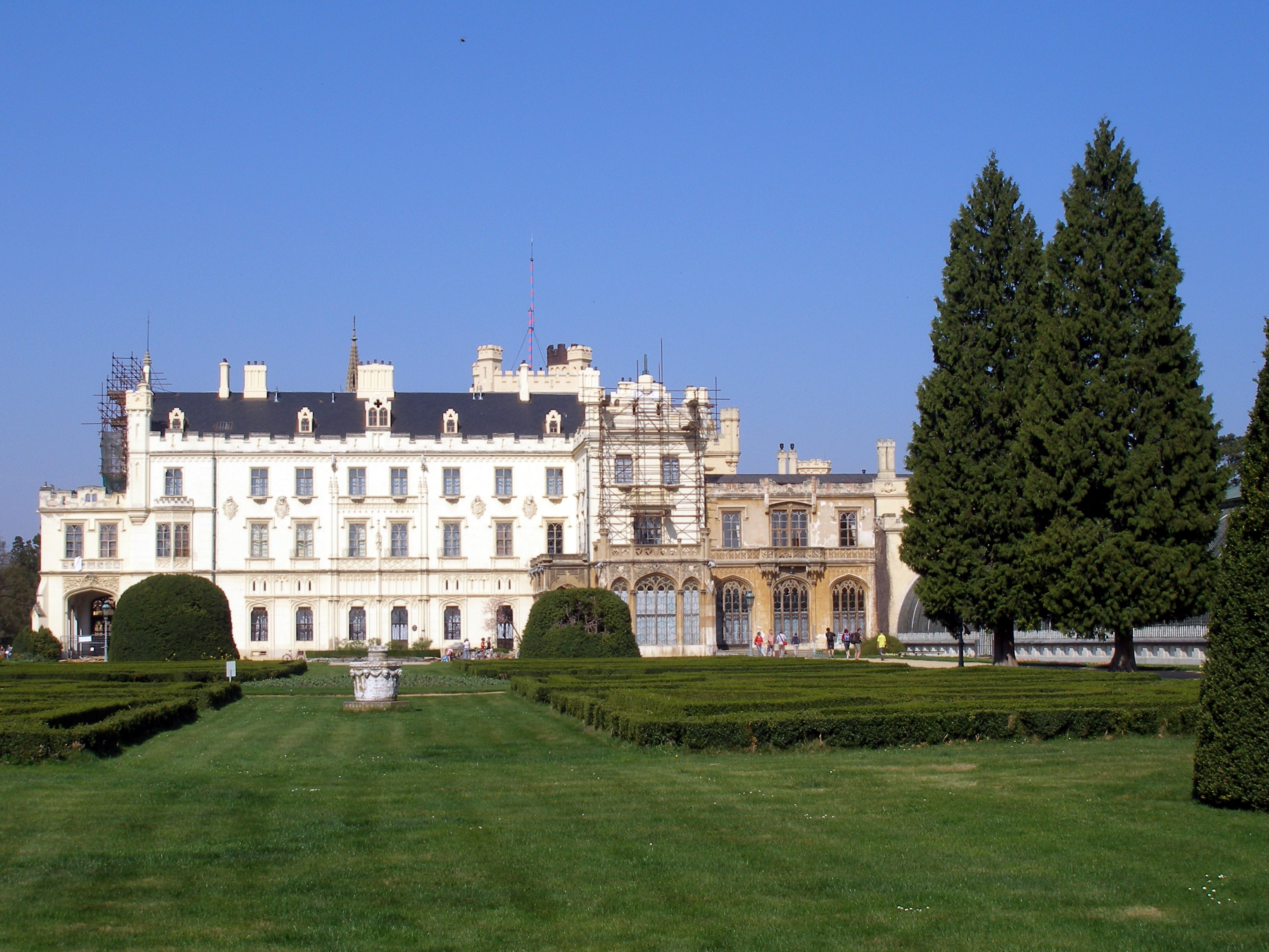 Štátny zámok Lednice na Morave Česká republika